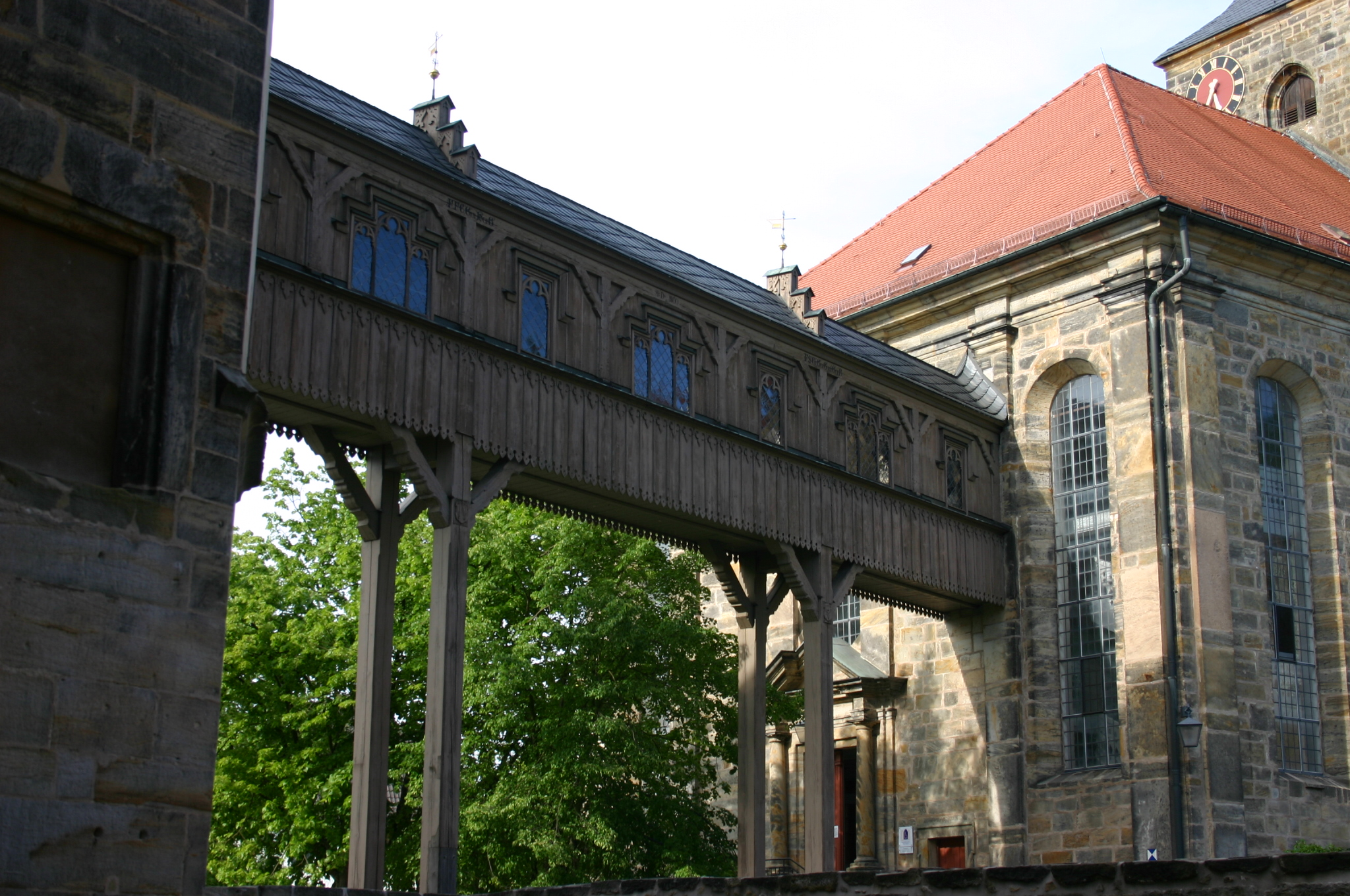 Übergang St.-Laurentius-Kirche, Thurnau